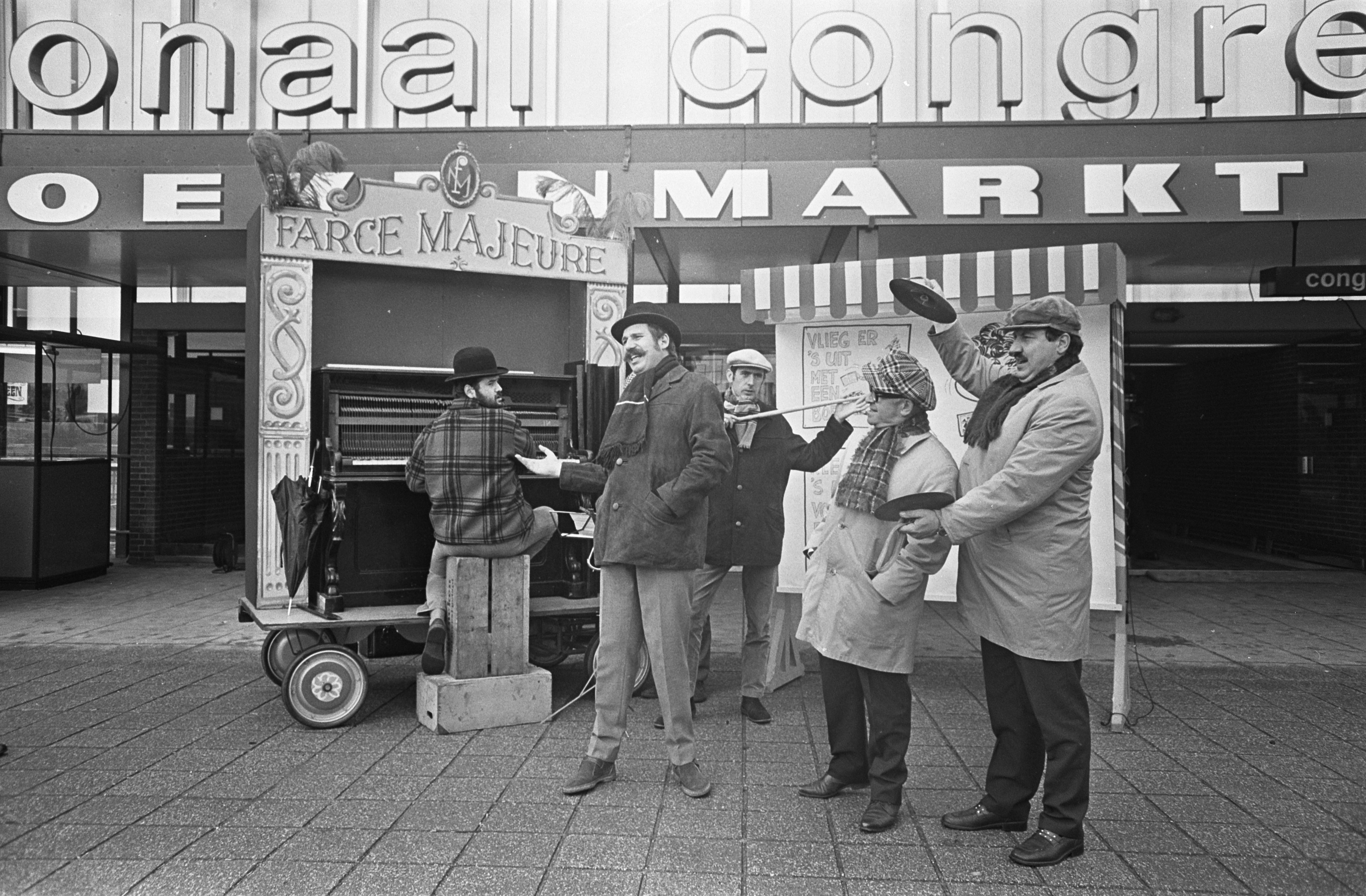 Collectie / Archief : Fotocollectie Anefo Reportage / Serie : [ onbekend ] Beschrijving : Farce Majeure bij de RAI. V.l.n.r. Henk van der Horst, Ted de Braak, Jan Fillekers, Alexander Pola en Fred Benavente Datum : 17 oktober 1968 Locatie : Amsterdam, Noord-Holland Trefwoorden : groepen Persoonsnaam : Benavente, Fred, Braak, Ted de, Fillekers, Jan, Horst, Henk van der, Pola, Alexander Instellingsnaam : Farce Majeure Fotograaf : Nijs, Jac. de / Anefo Auteursrechthebbende : Nationaal Archief Materiaalsoort : Negatief (zwart/wit) Nummer archiefinventaris : bekijk toegang 2.24.01.05 Bestanddeelnummer : 921-7733 Reacties Geplaatst door Maaike op 21 mei 2013 - 20:58. Persoonsnamen: Boekenmarkt